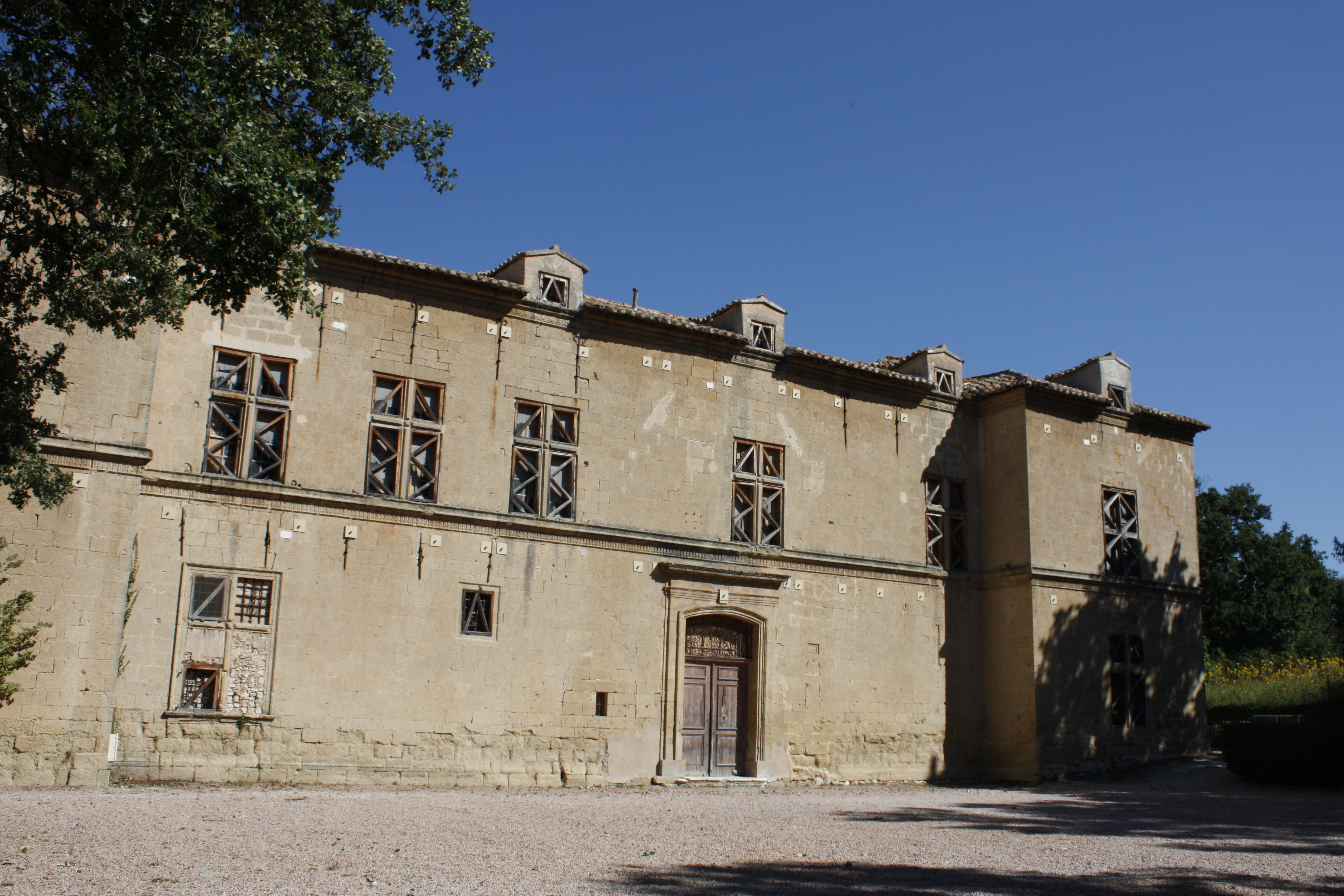 Façade principale du château du Grand-Saint-Jean sur le plateau de Puyricard, près d'Aix-en-Provence .